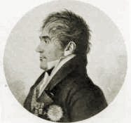 Général_Edouard_Jean_Baptiste_Milhaud